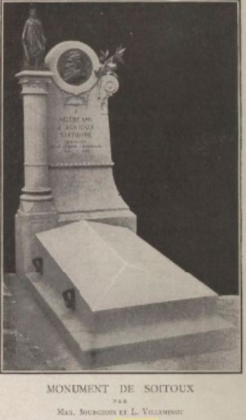 tombe de Jean-François Soitoux, monument funéraire au cimetière de Montparnasse par Maximilien Bourgeois et L. Villeminot, 1891